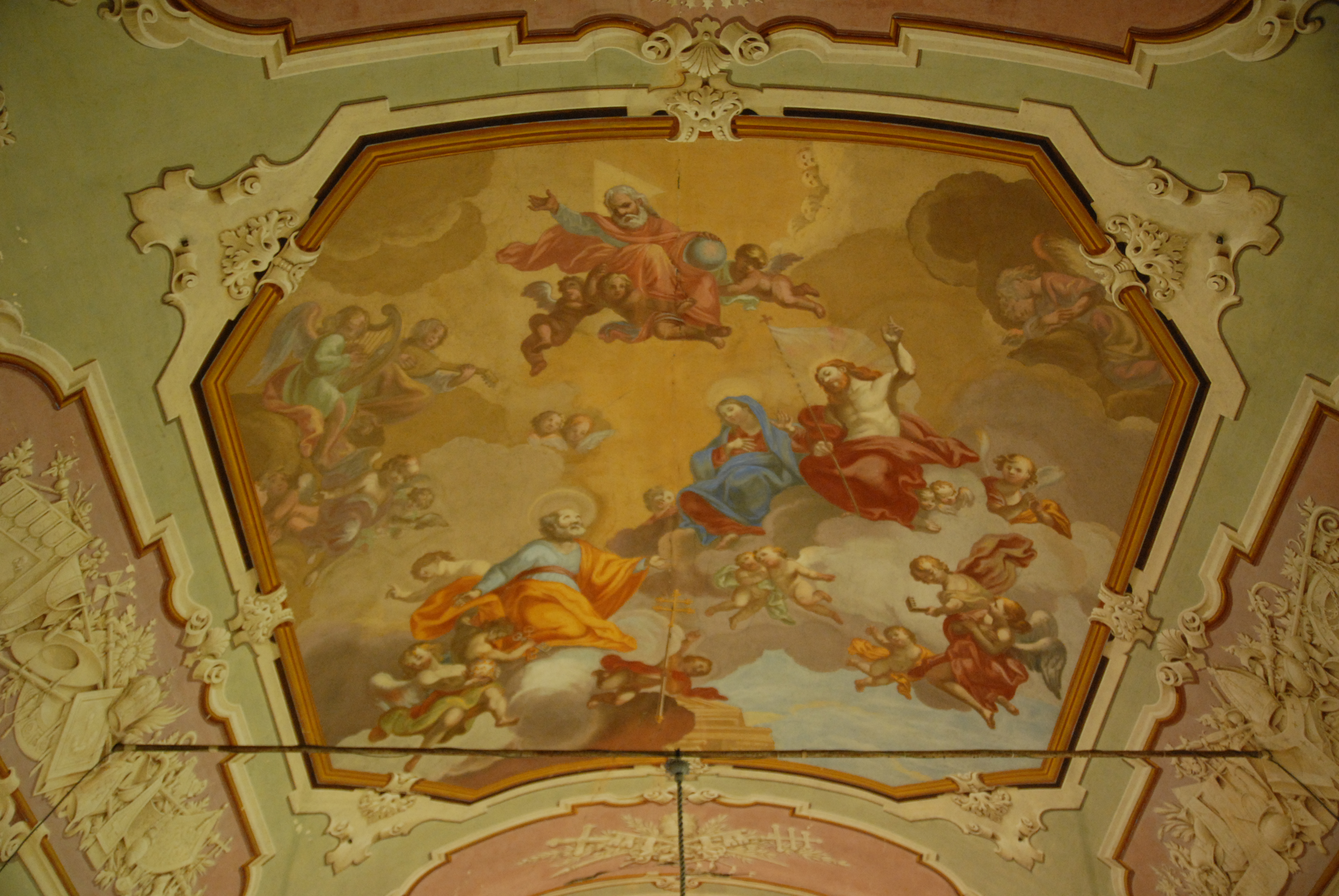 Armani, Borgo di Corliano, Chiesa dei Santi Pietro e Paolo, 2008